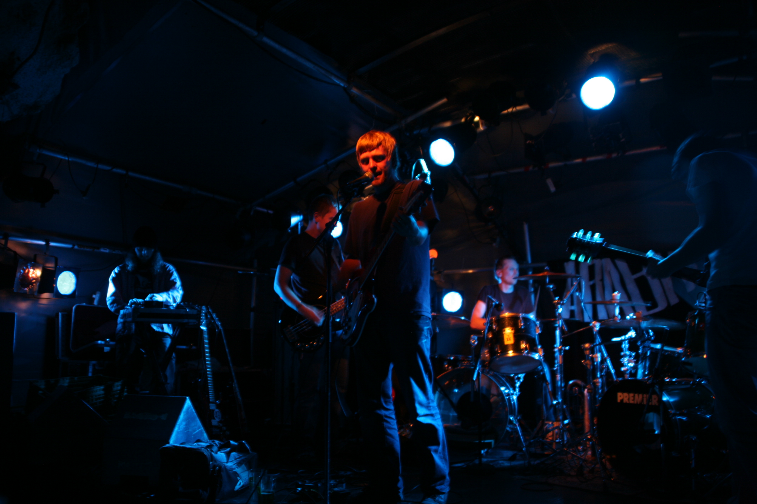 Hulen i Bergen men Bandet Syntax Ether Demo